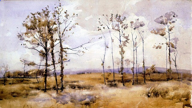 Craigenputtock